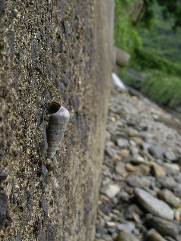 フトヘナタリ。コンクリート護岸に登り、殻口の外側を粘液でくっつけて休息している。長崎市にて(Cerithidea rhizophorarum, Nagasaki)